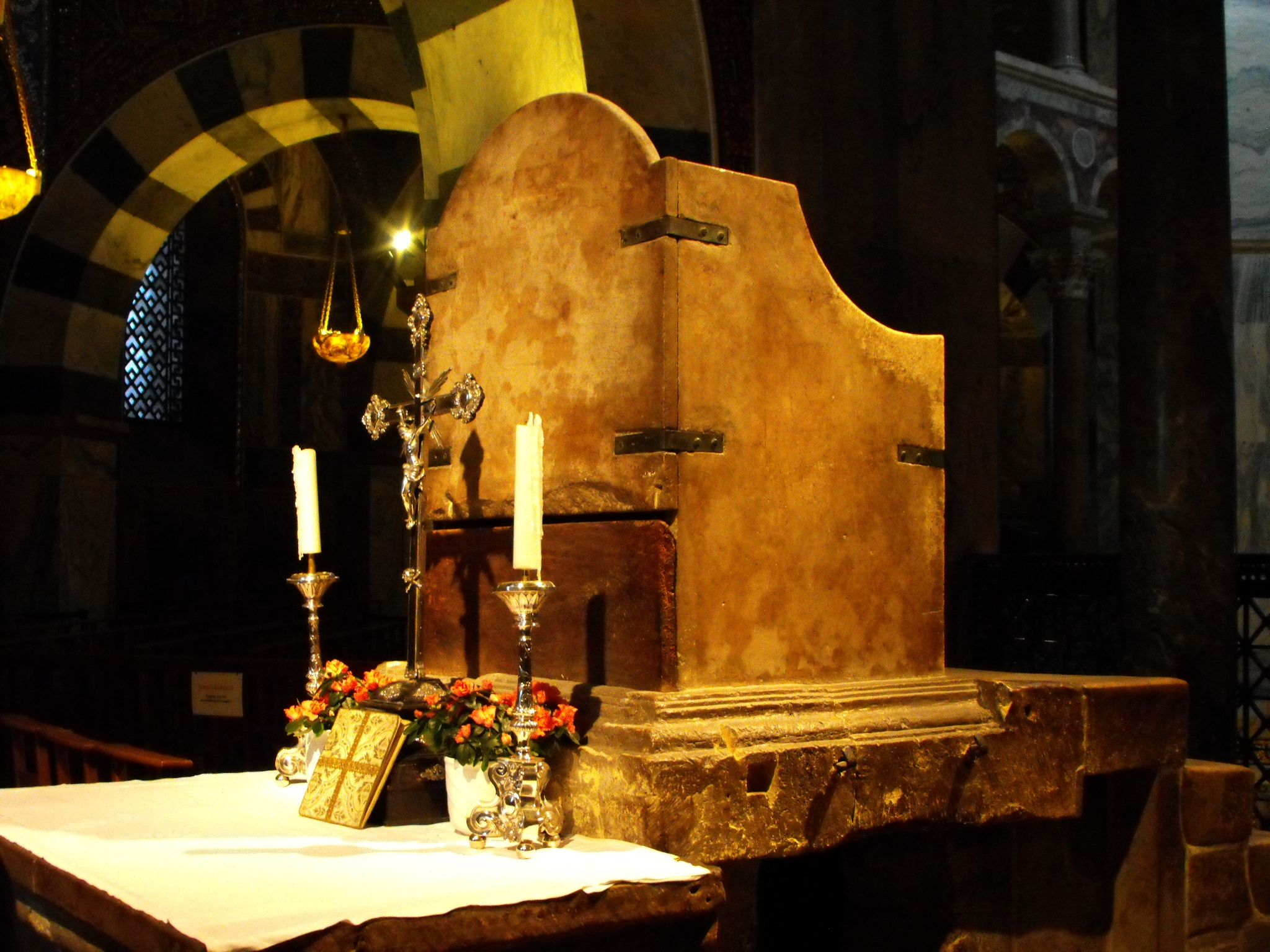 Der Aachener Königsthron im Dom